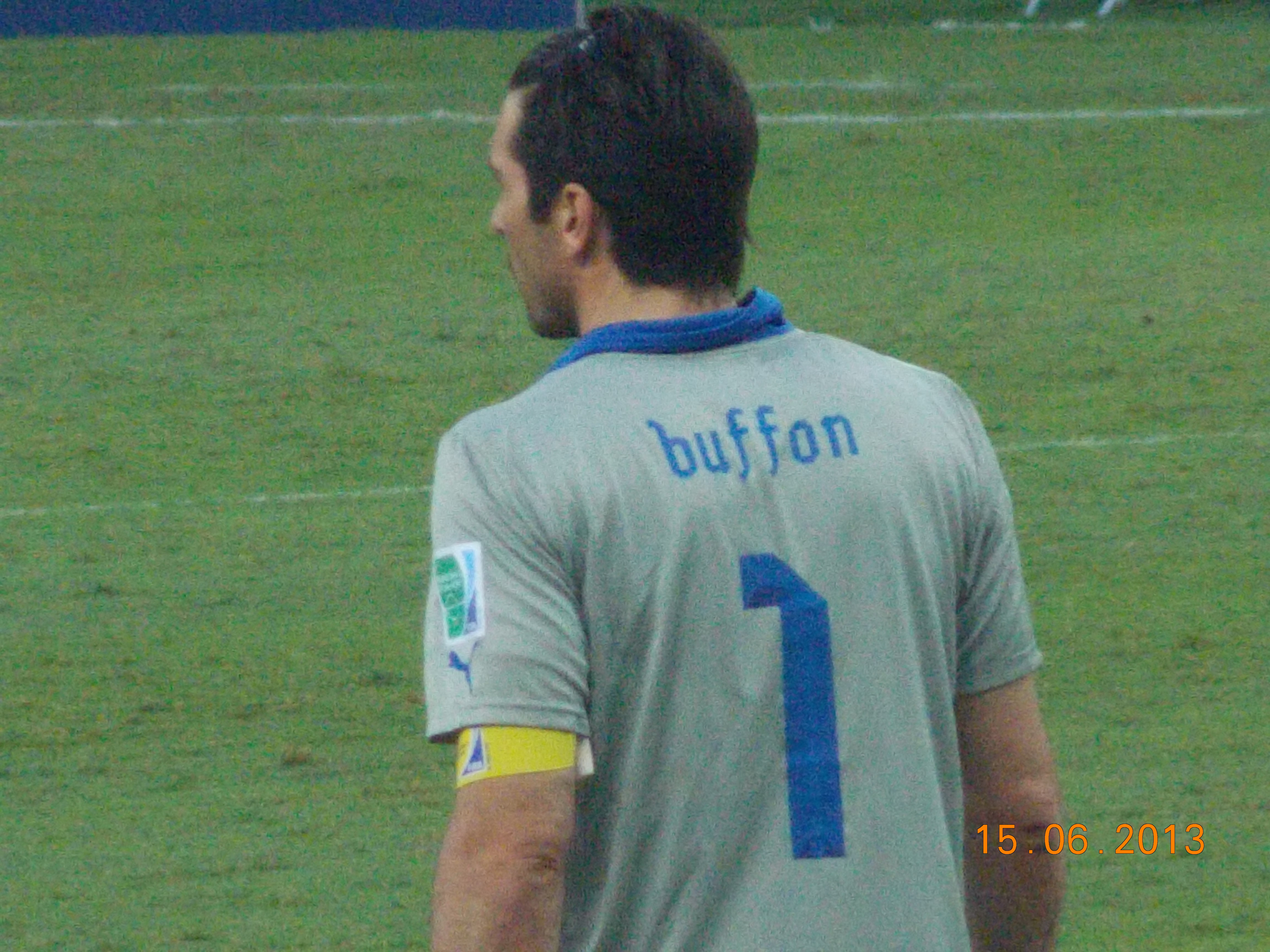 Confederations Cup 2013, Maracanã Stadium, Mexico 1 x 2 Italy.